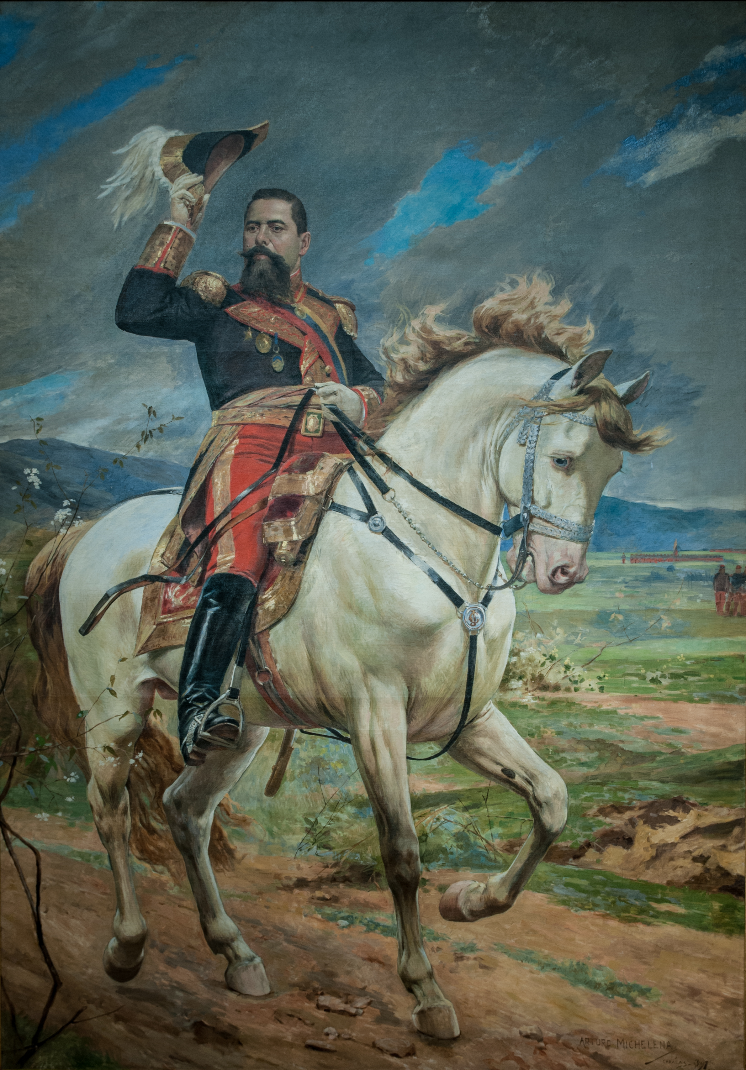 Equestrian portrait of General Joaquin Crespo